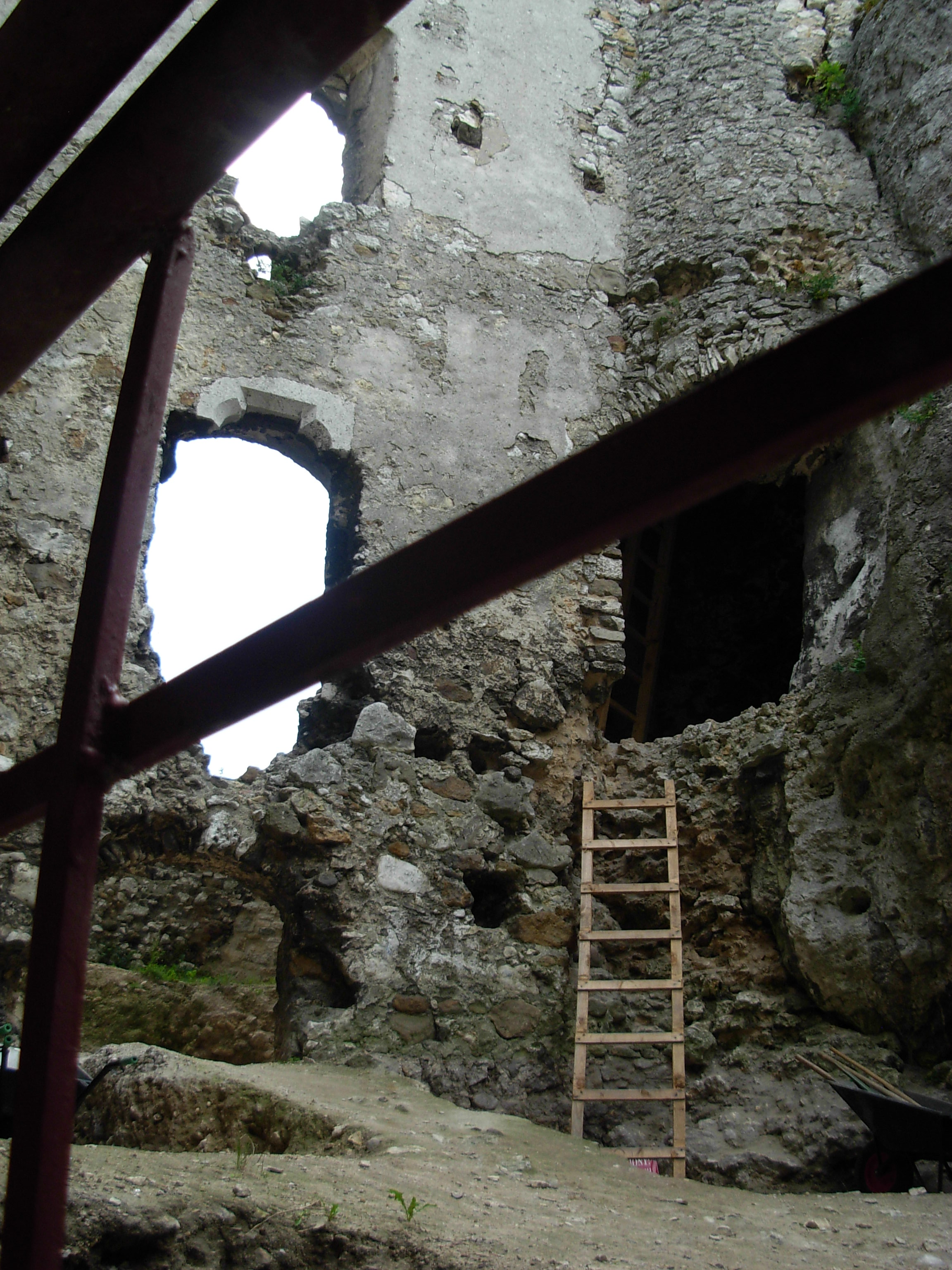 Mirów Castle